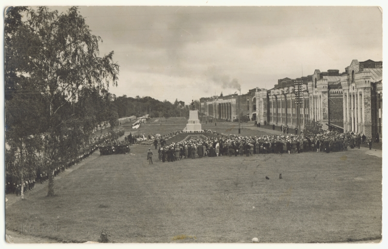 1924. aasta 1. detsembri riigipöördekatse käigus hukkunud kadettide monumendi avamine Tondi Sõjakooli juures